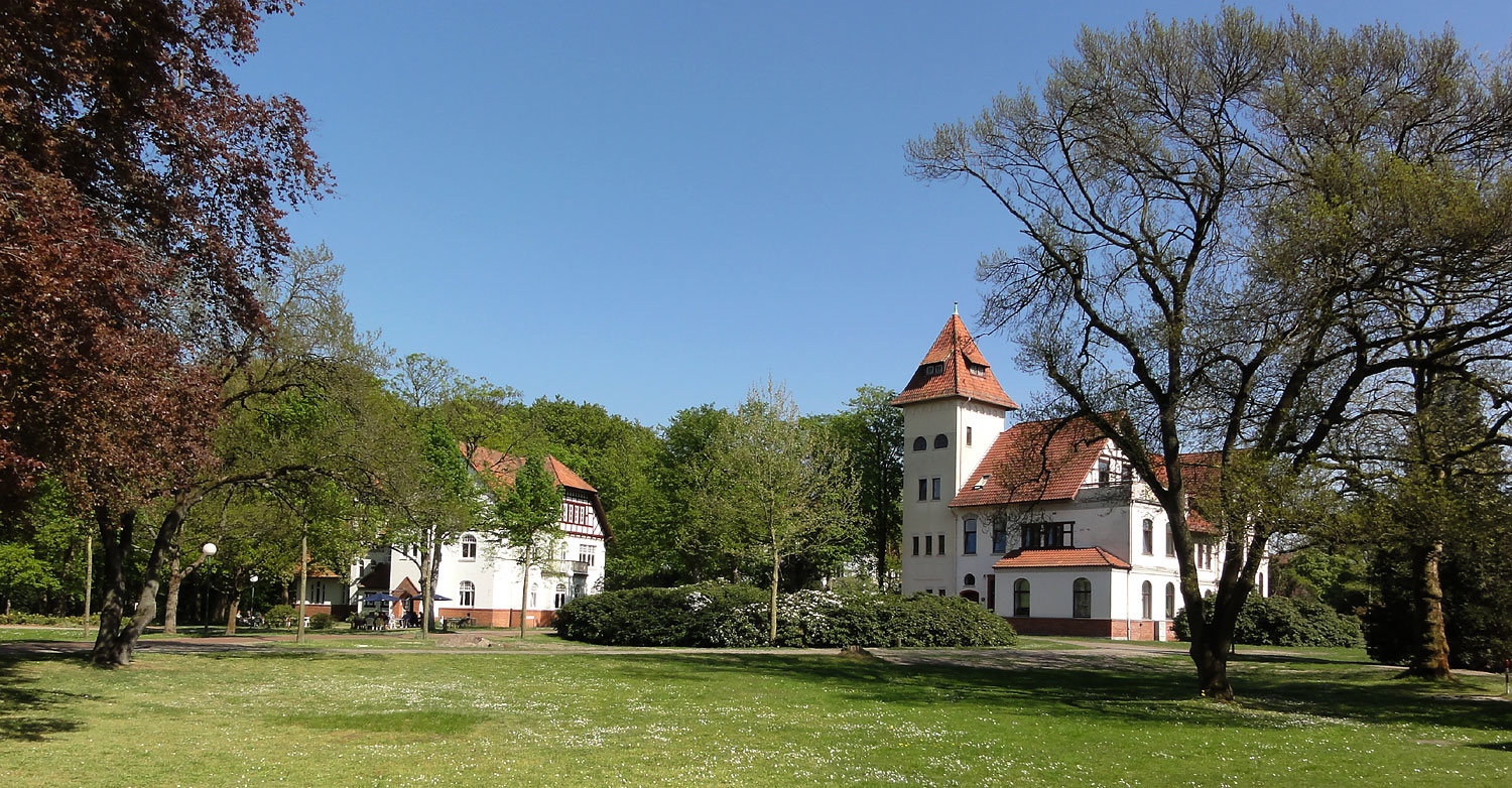 Klinikum Bremen-Ost, Park + Haus 17+9. Ehemals St. Jürgen Asyl, Haus XXVIII. Herstellung 1900–1904. Funktion: Anstaltsgarten Das abgebildete Objekt ist ein geschütztes Kulturdenkmal in der Freien Hansestadt Bremen, mit der Nr. 1656 beim Landesamt für Denkmalpflege registriert.